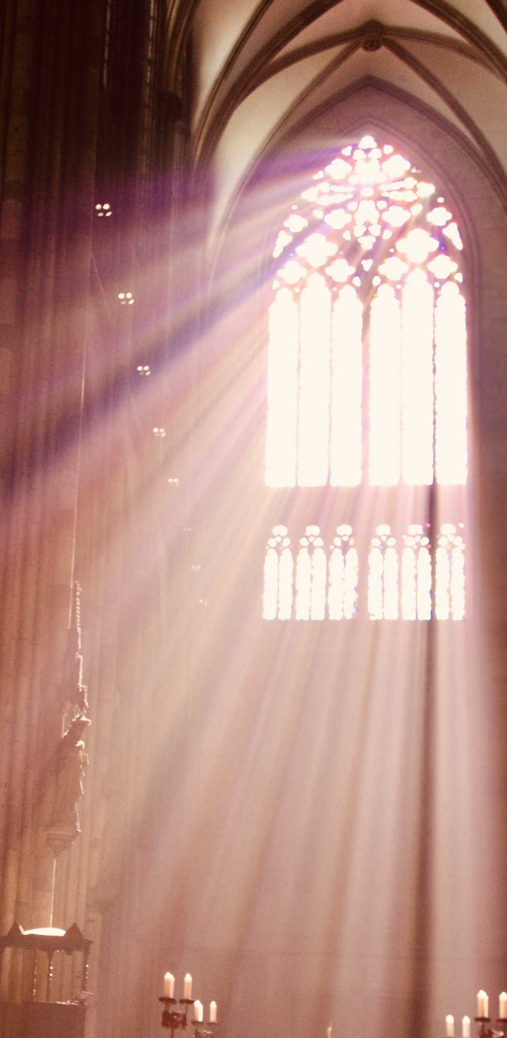 Koln Dom, Germany